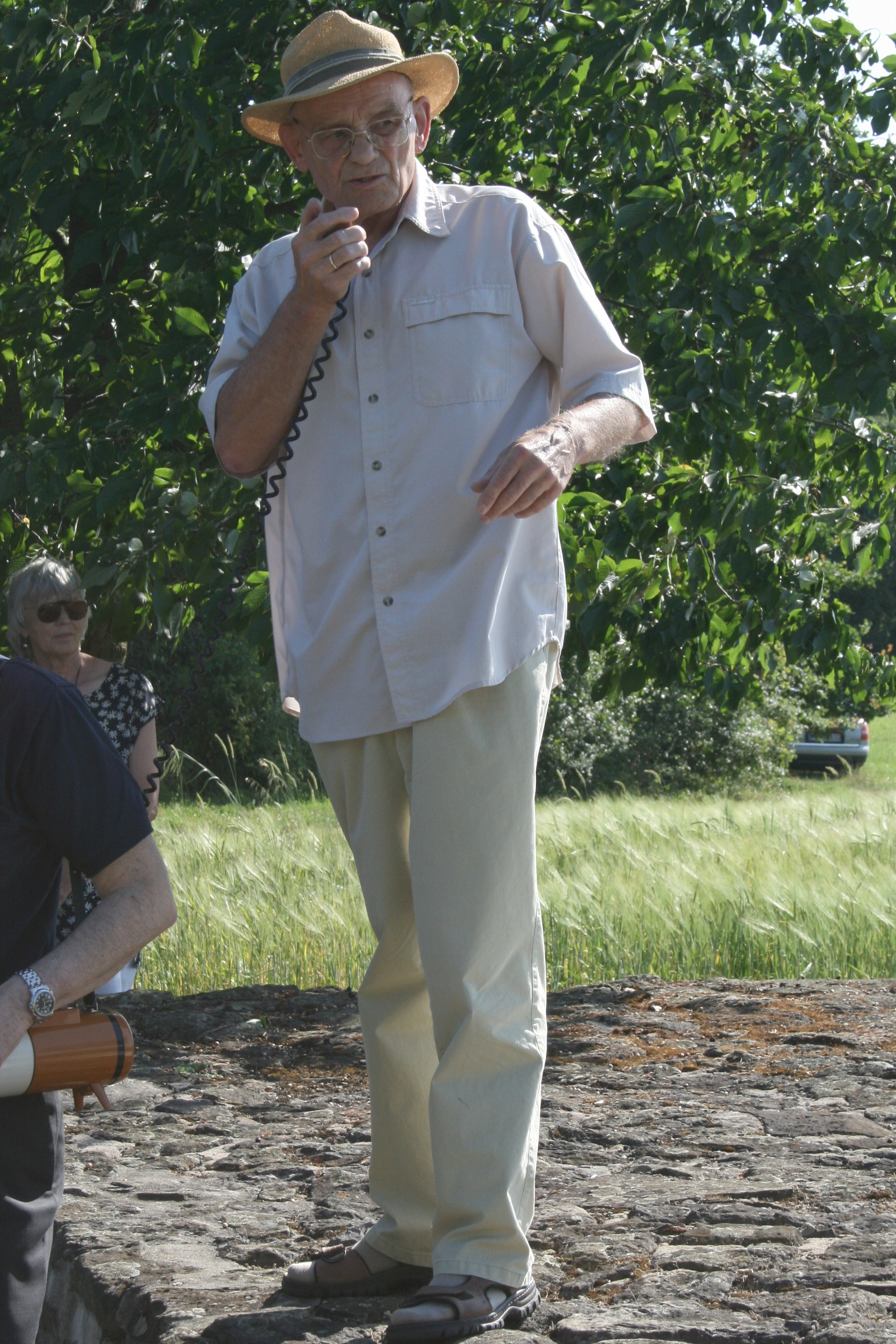 Fritz-Rudolf Herrmann, pensionierter Landesarchäologe aus Hessen (Deutschland), im Sommer 2009 bei einer Führung an der Burg Arnsburg bei Lich.